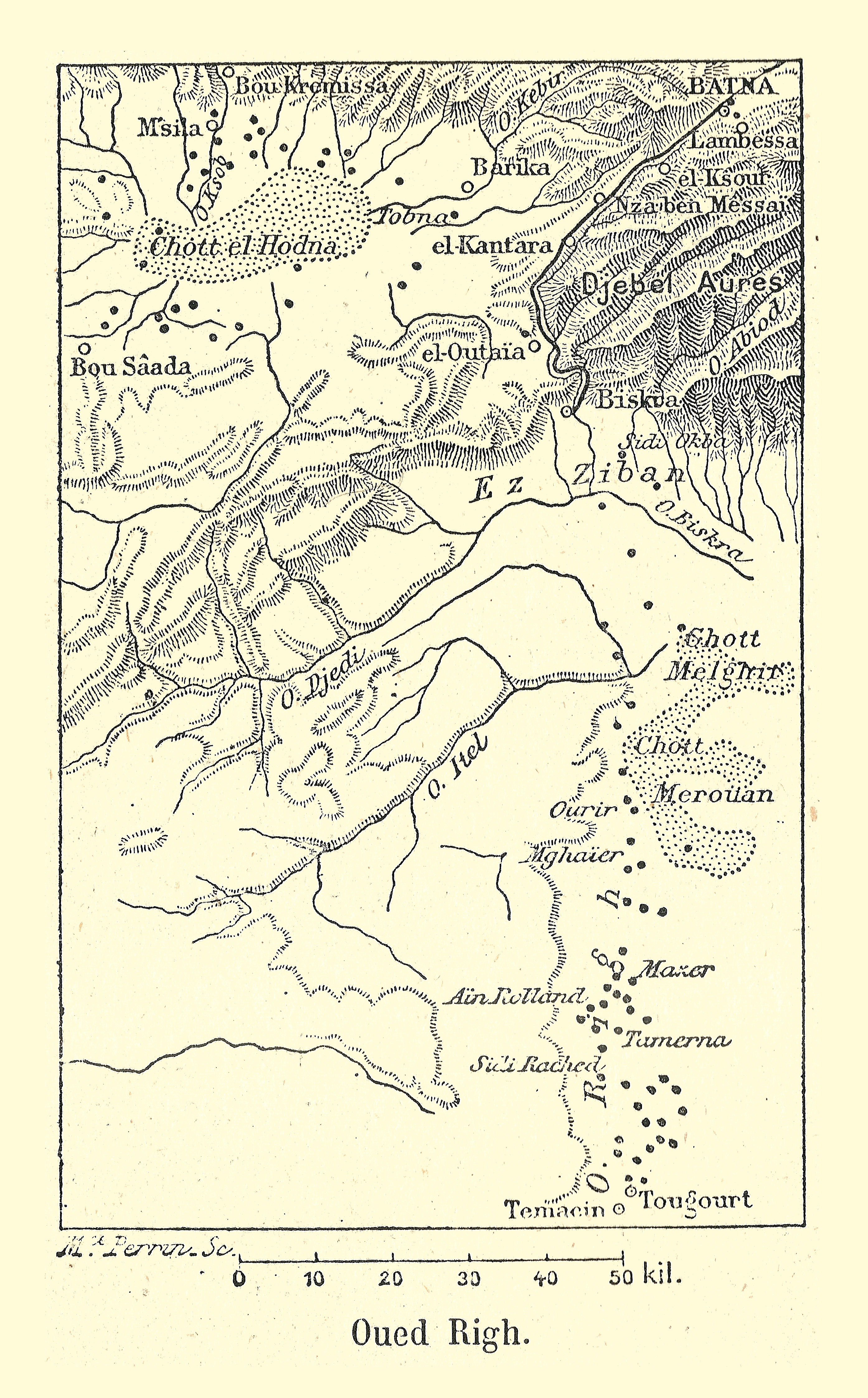 Carte de Franz Schrader